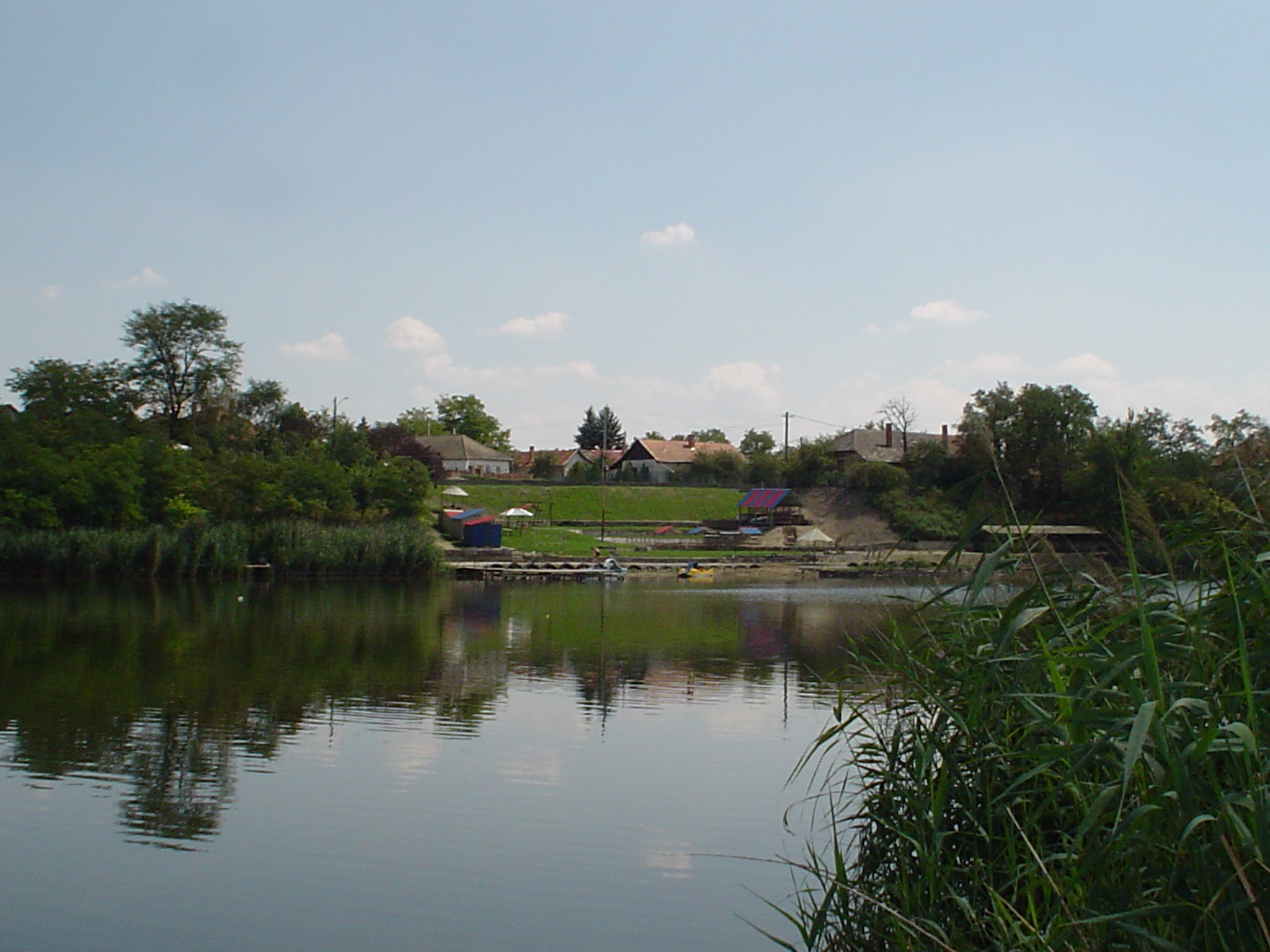 Morta Tiso ĉe Cibakháza